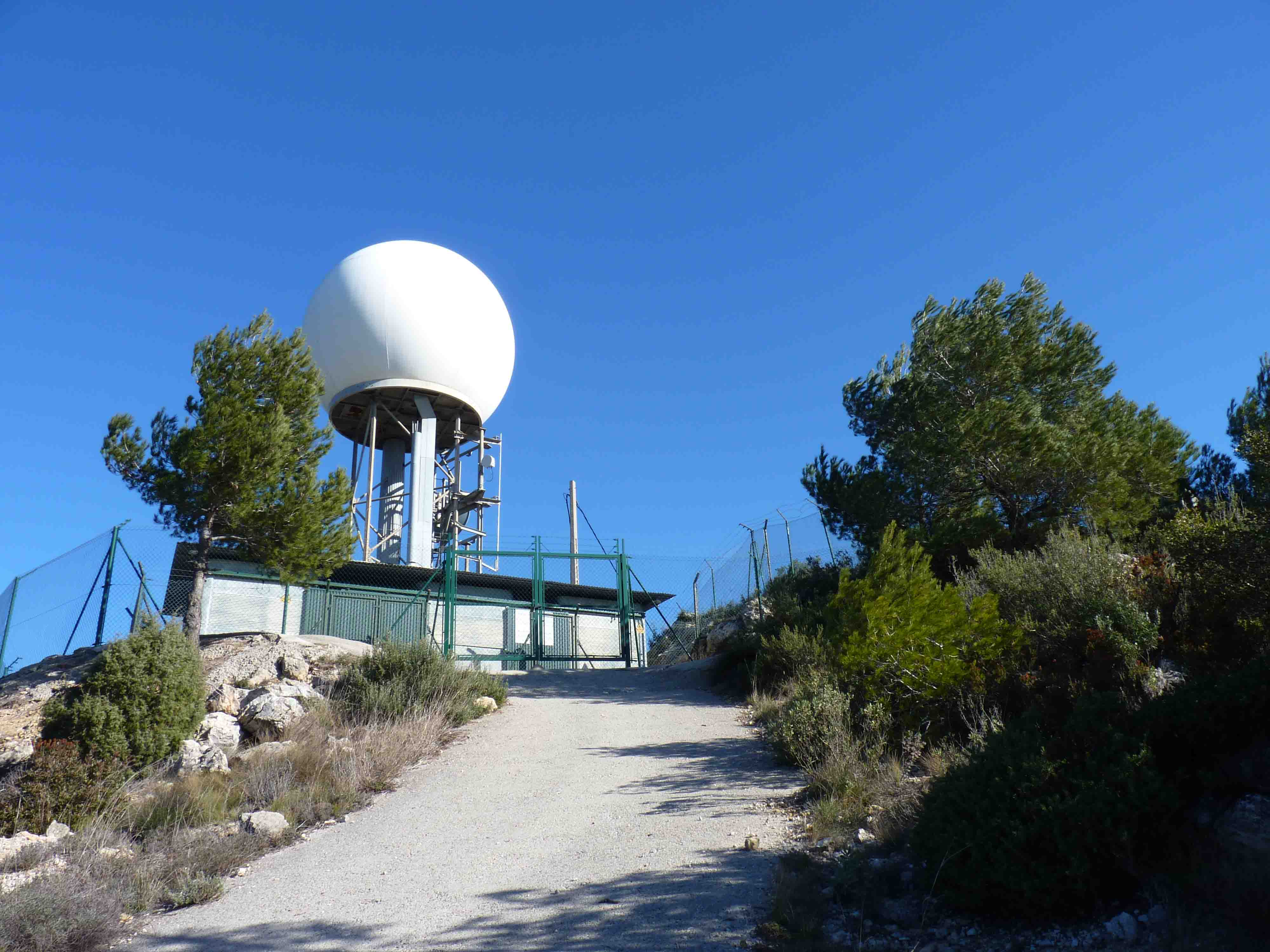 Radar del Servei Metereologic de Catalunya